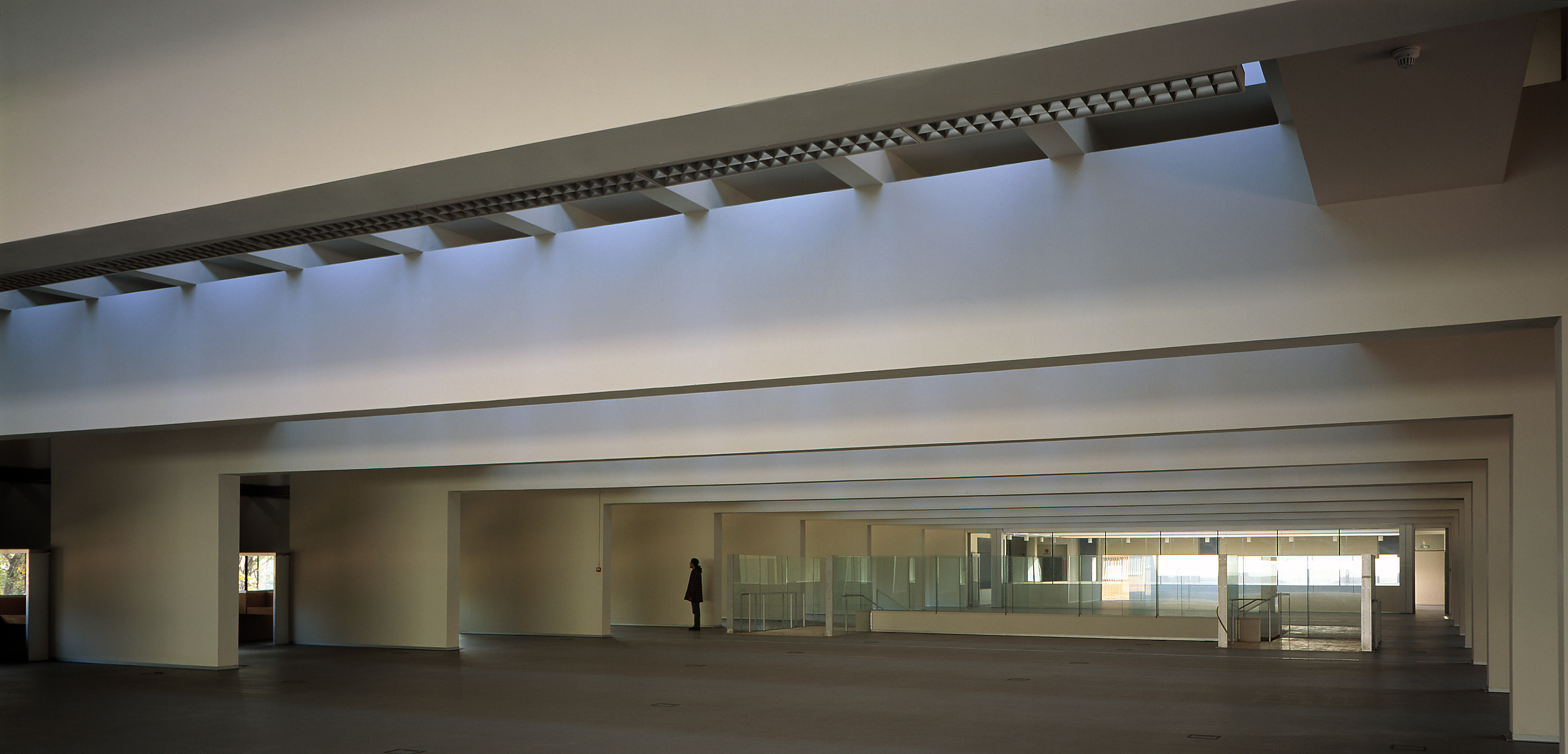 MARIANO BAYÓN Biblioteca de Villaverde